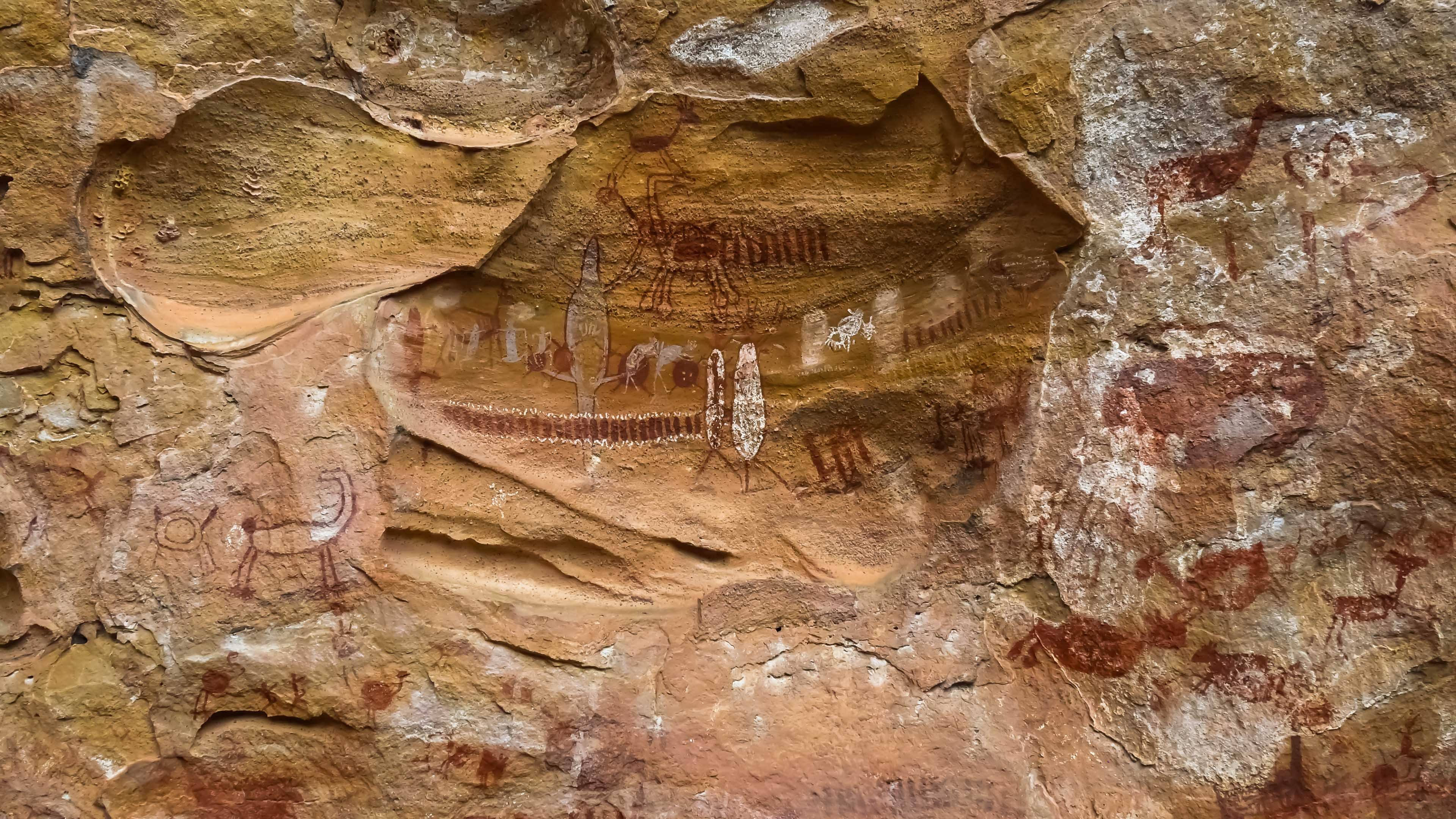 Parque Nacional da Serra da Capivara